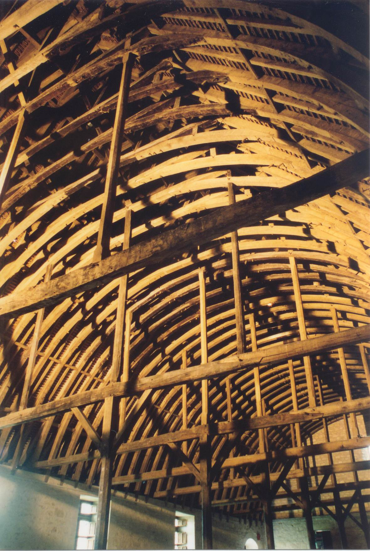 Dortoir des convers, abbaye de Noirlac